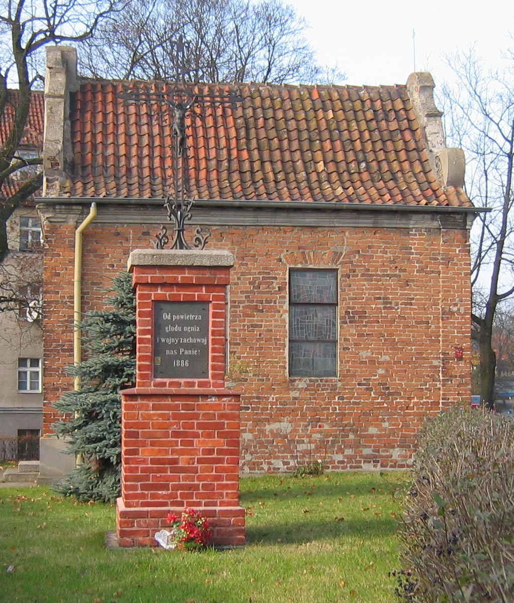 Olsztyn - Kaplica Jerozolimska (zrobione 27.10.2007)